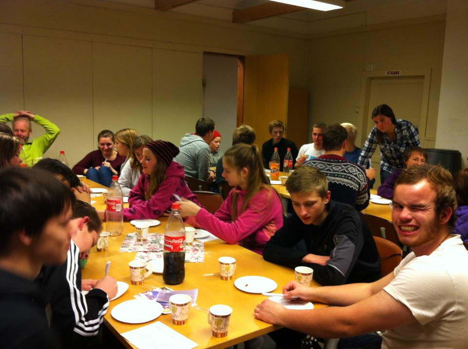 Bibelsmugling etterfulgd av mat